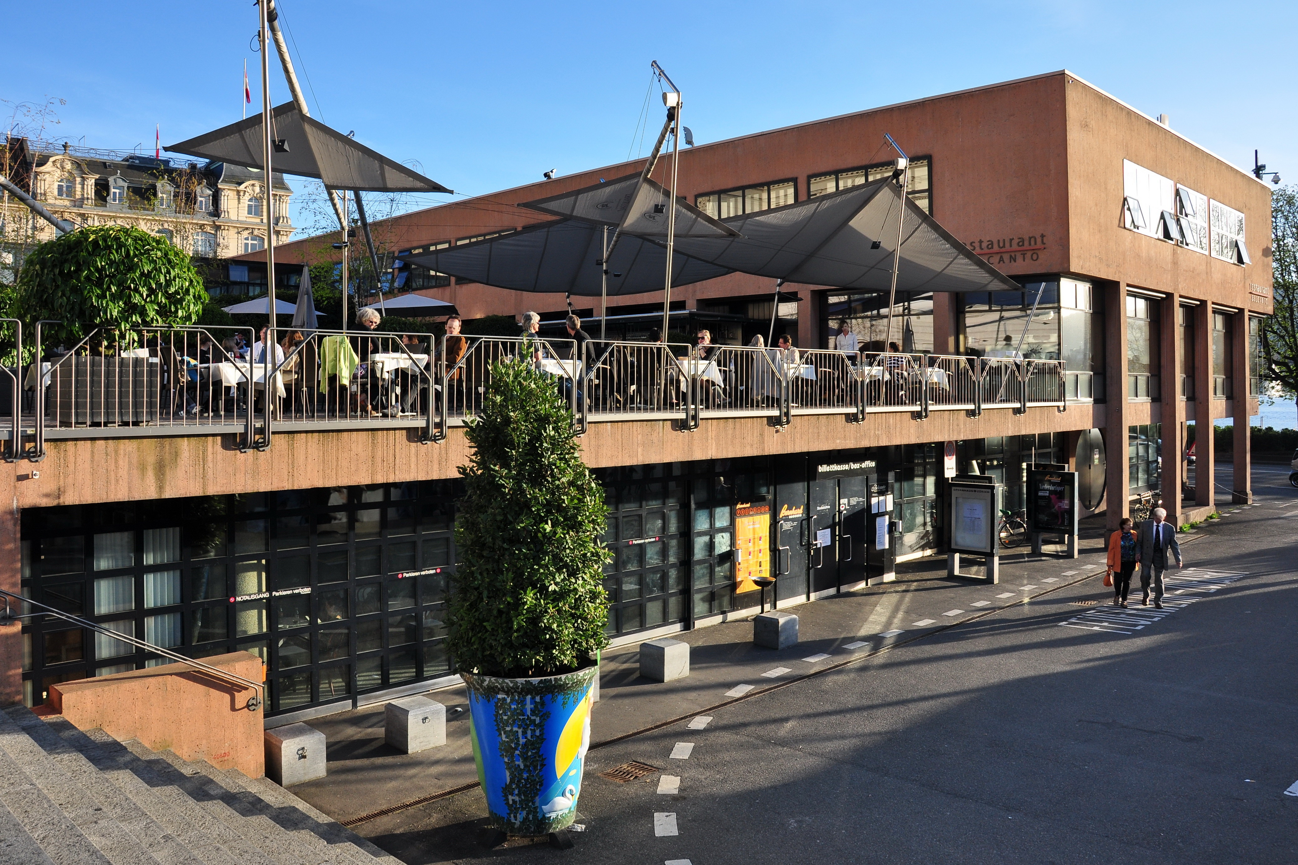 Bernhard-Theater in Zürich (Switzerland)